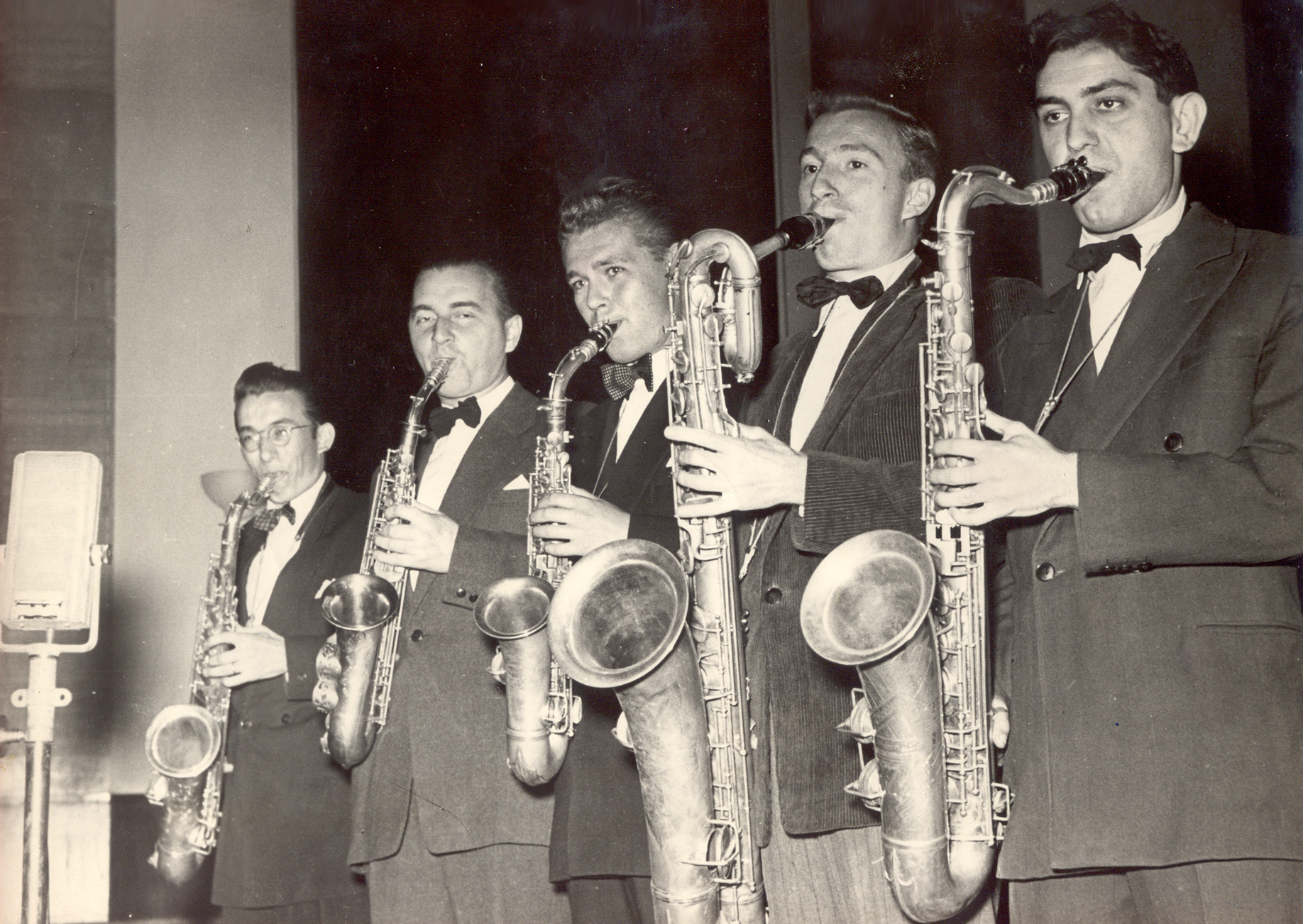 Srpskohrvatski / српскохрватски: Linija saksofona (sdesna-nalevo): drugi, posle Eduarda Sađila, je Mika-Žuti.